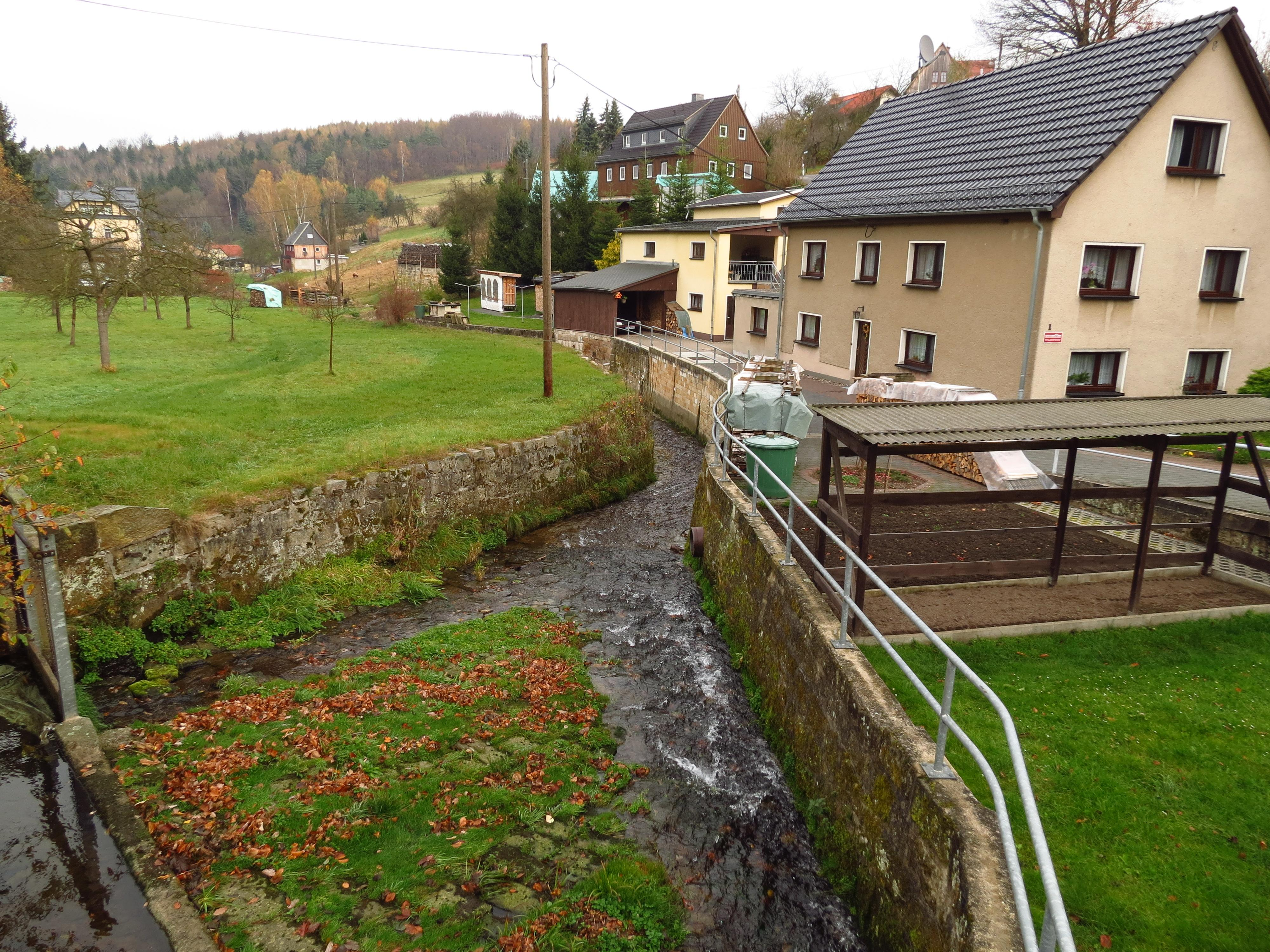 Biela in Bielatal (am Eisenhammerr).